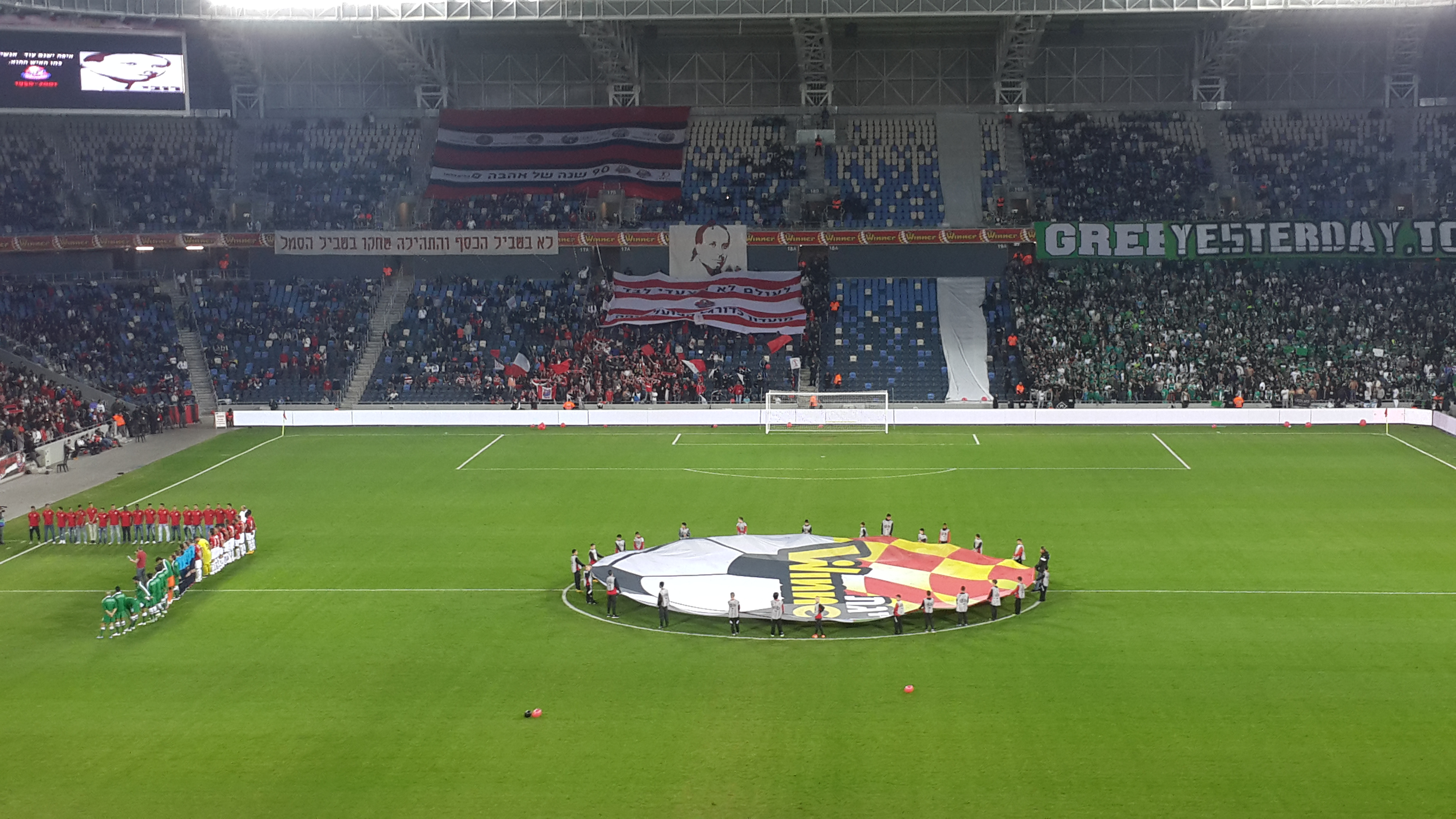 הדרבי של חיפה הראשון באצטדיון סמי עופר